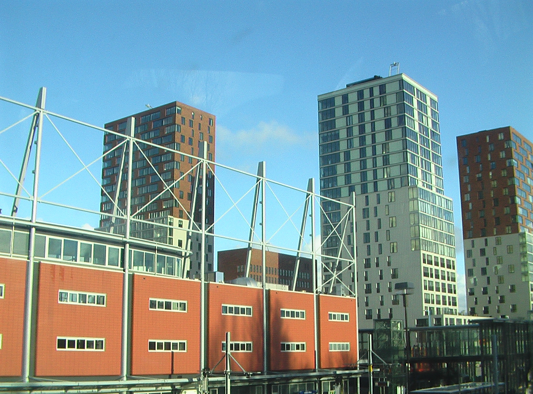 Zoetermeer, Nederland (Netherlands)